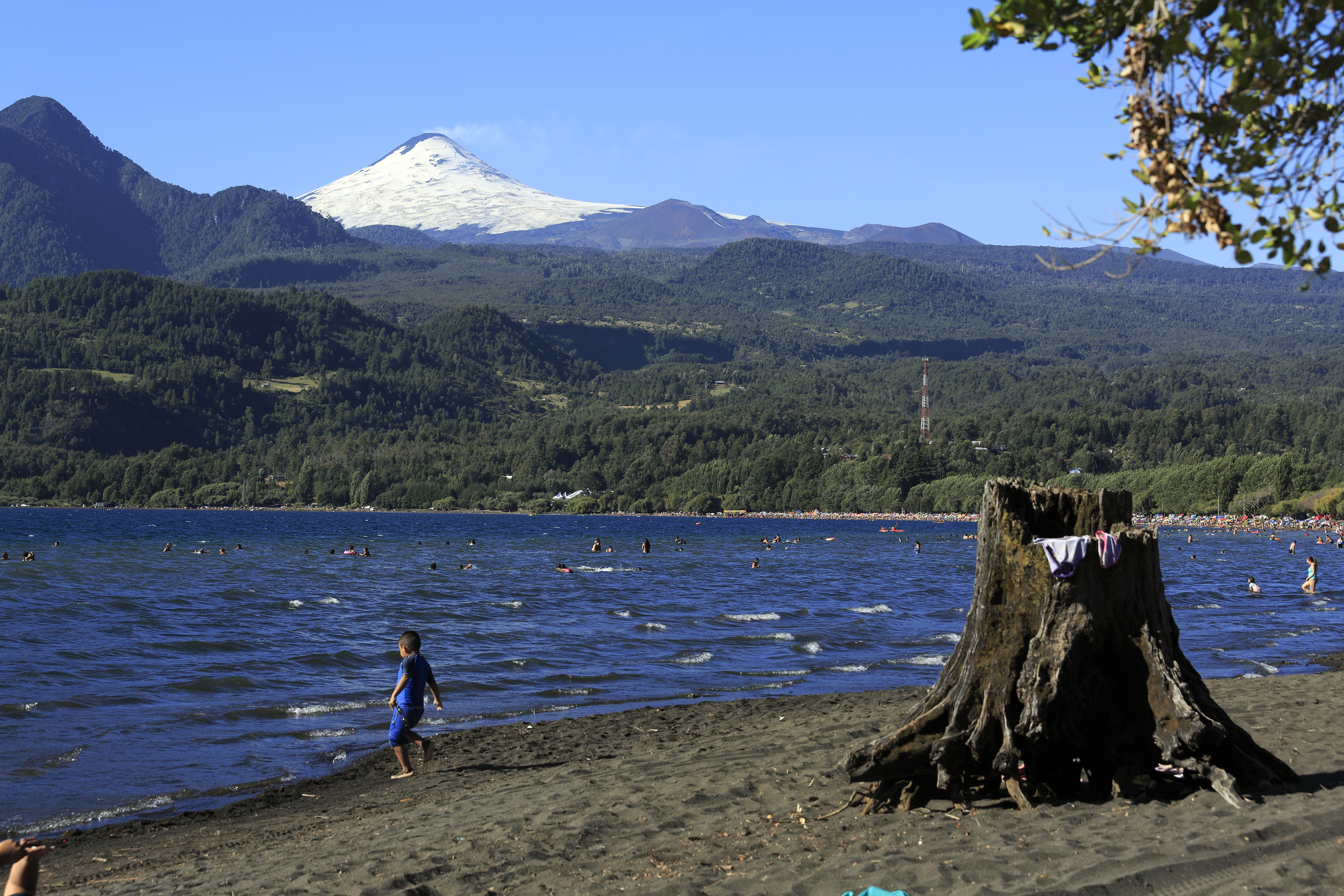 Am Ostufer des Lago Calafquén, der Baumstumpf ist nicht angetrieben worden, sondern der Baum an dieser Stelle gewachsen. Einige Wurzeln sind noch erhalten. Im Hintergrund die vergletscherte Südflanke des Volcán Villarrica.